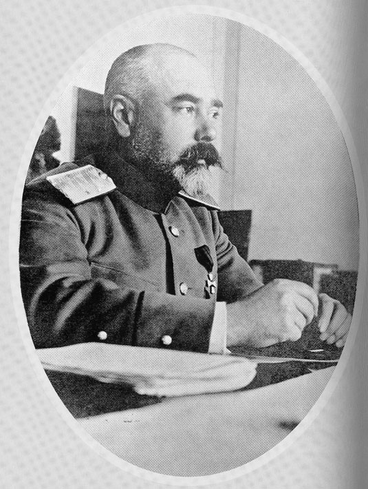 Генерал-майор А. И. Деникин